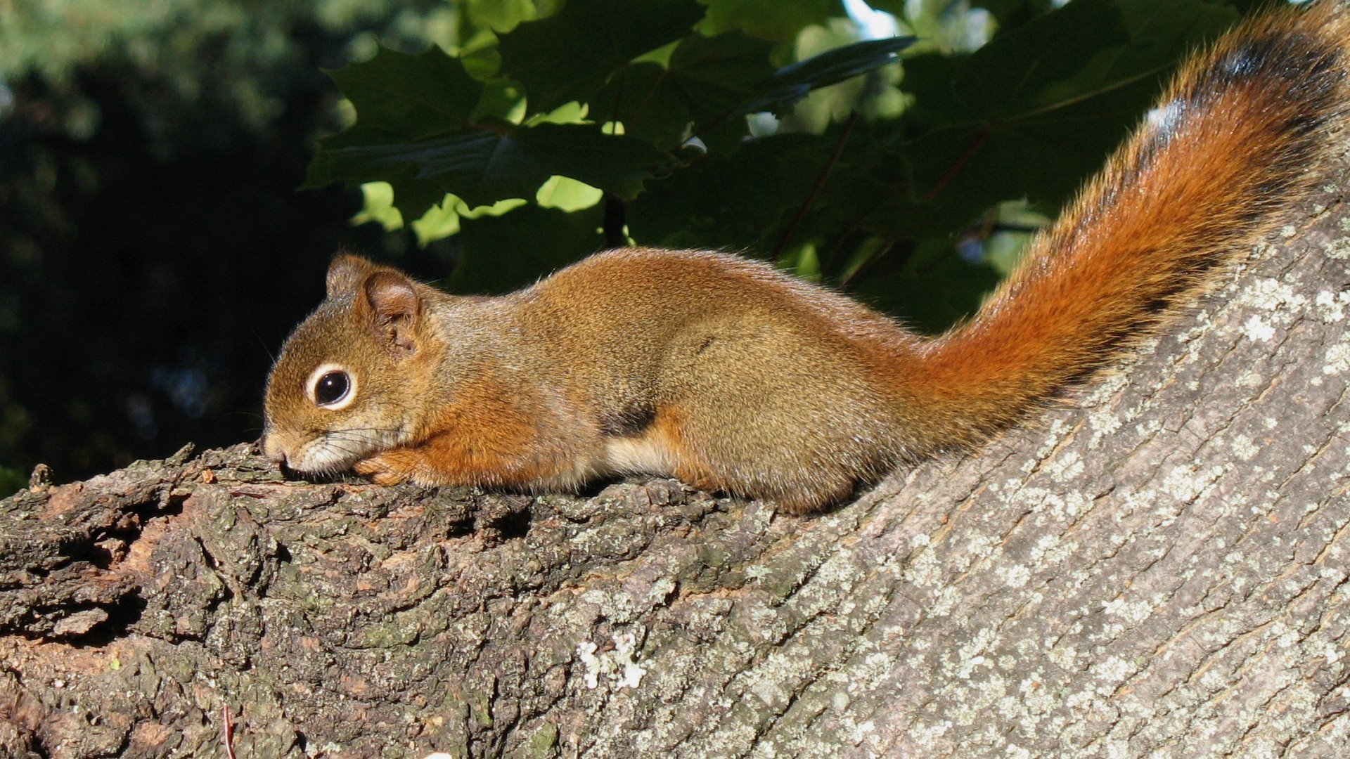 Tamiasciurus hudsonicus Écureuil roux nord-américain -- North American Red Squirrel Bas-Saint-Laurent -- Province de Québec -- Canada Prise en octobre 2007 -- Taken in October 2007